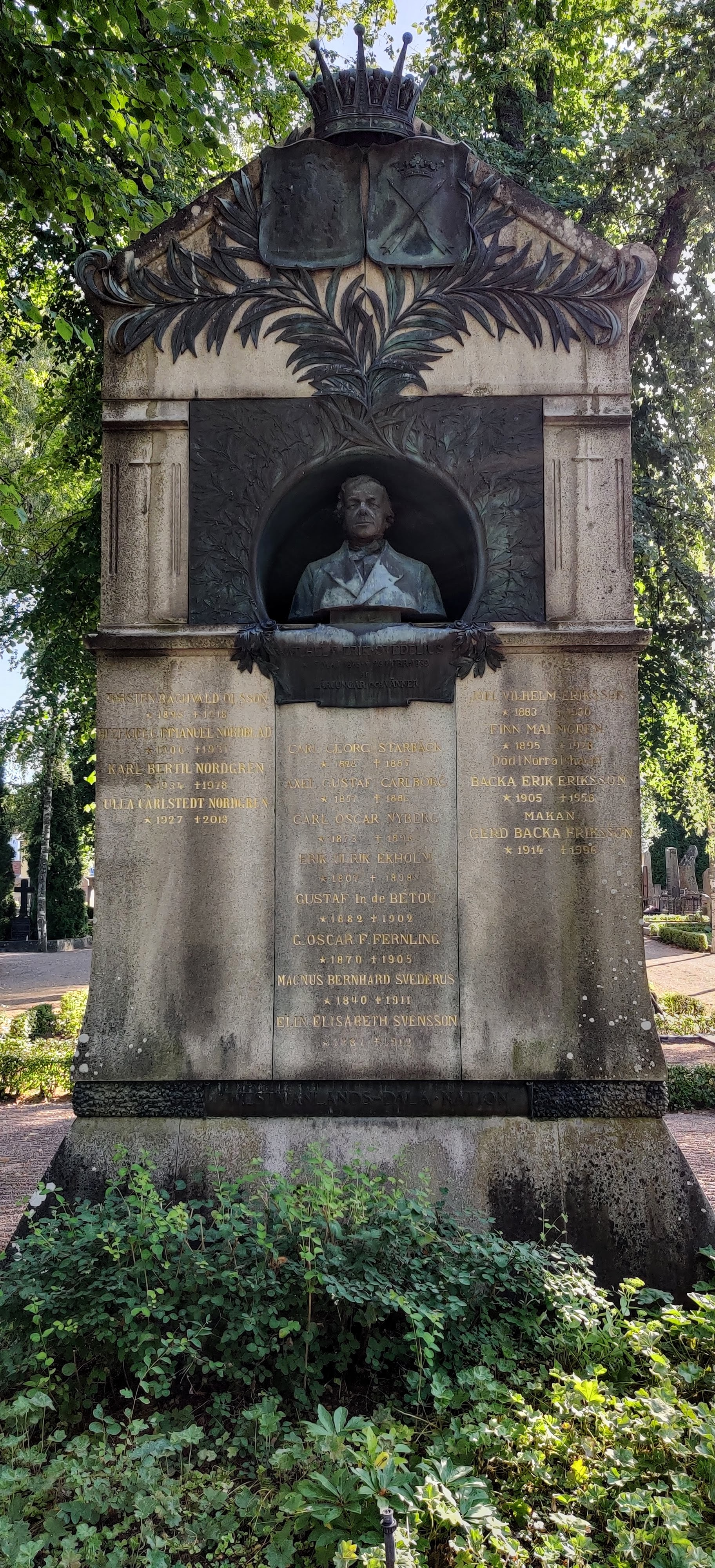 Gravvård på Uppsala gamla kyrkogård. Foto: Sture Svanljung.